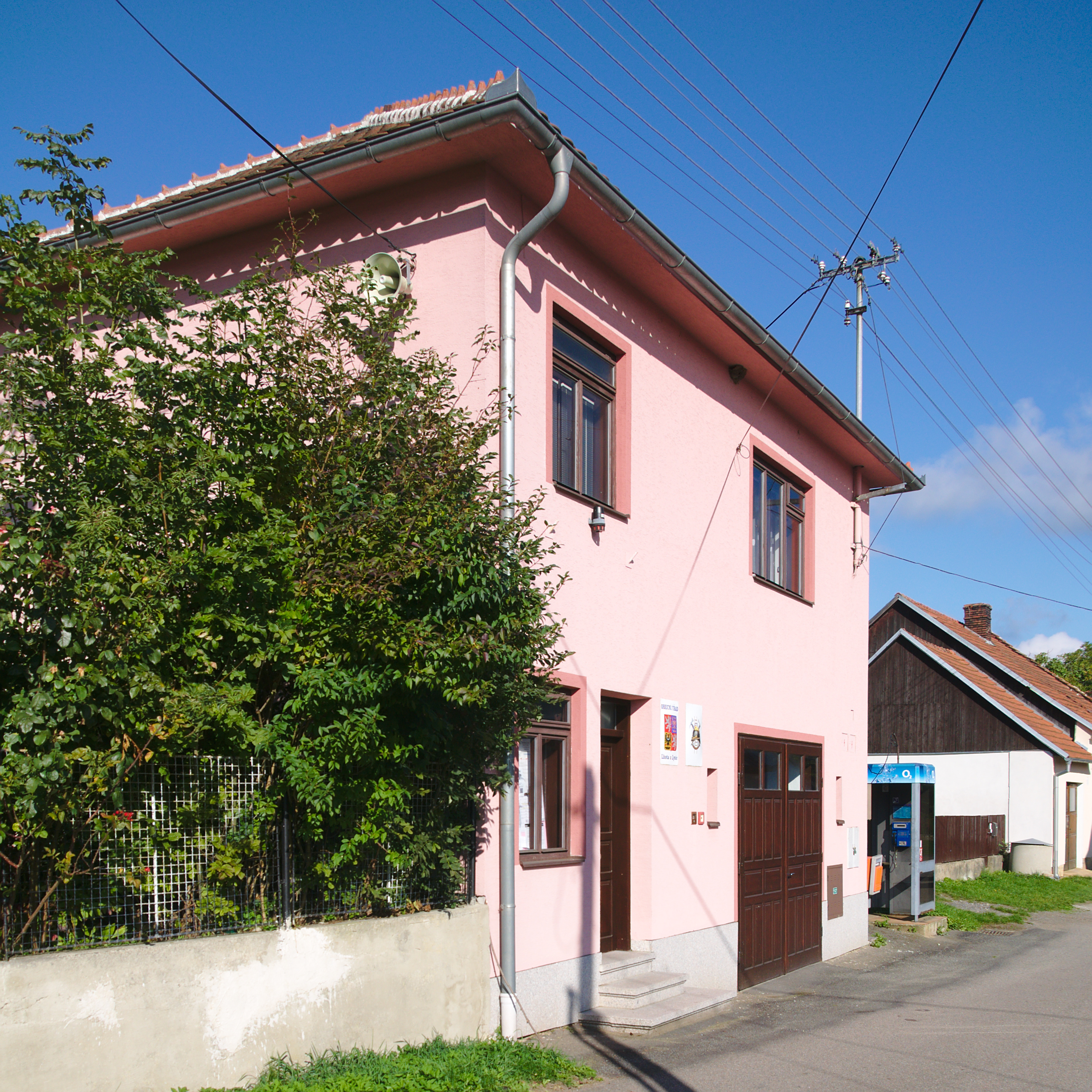 Obecní úřad, Lhota u Lysic, okres Blansko